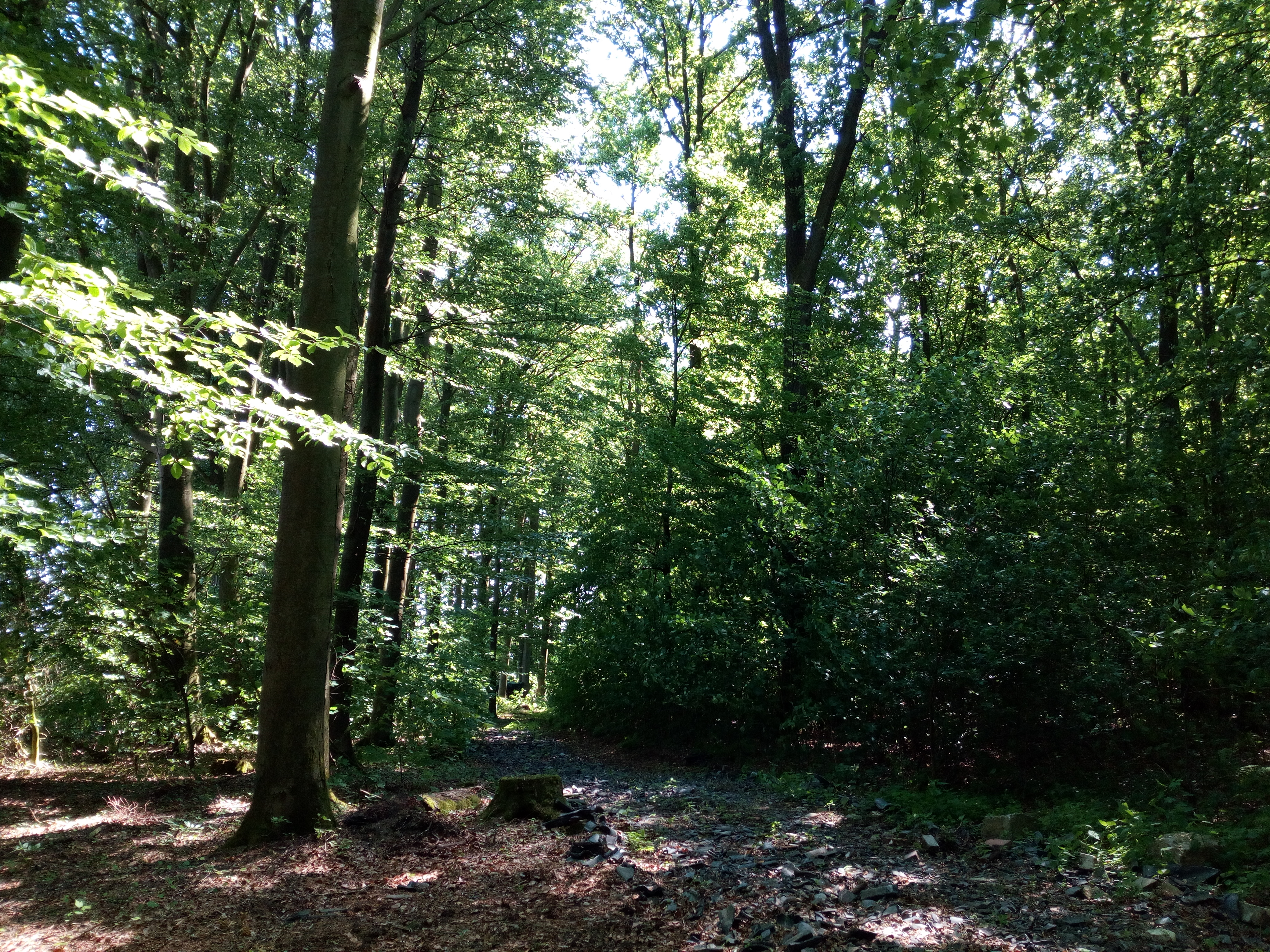 Ein kleines Landschaftsschutzgebiet, südlich von Melle in reizvoller Landschaft gelegen.